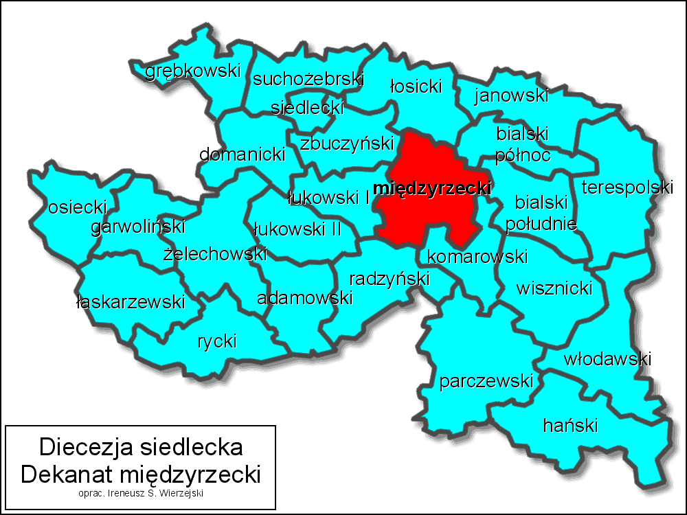 mapa diecezji siedleckiej z zaznaczonym dekanatem międzyrzeckim